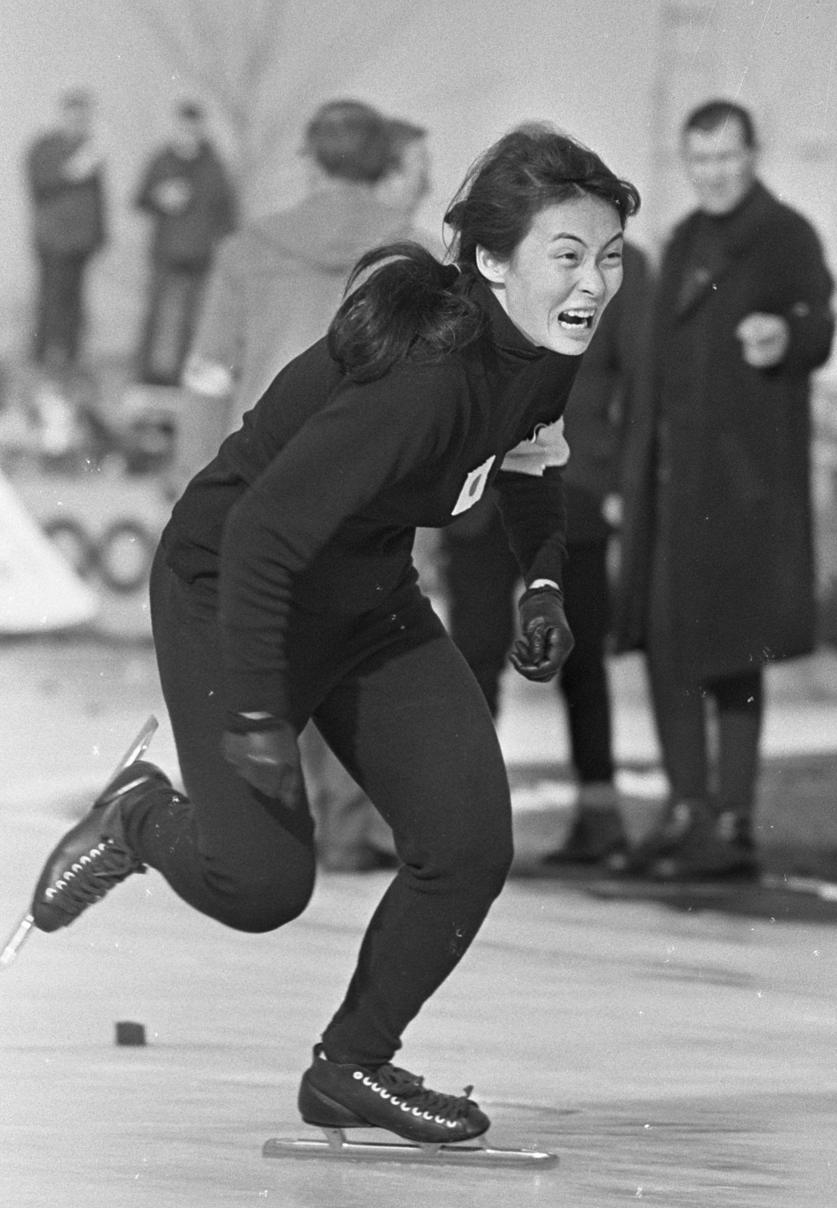 Sachiko Saito